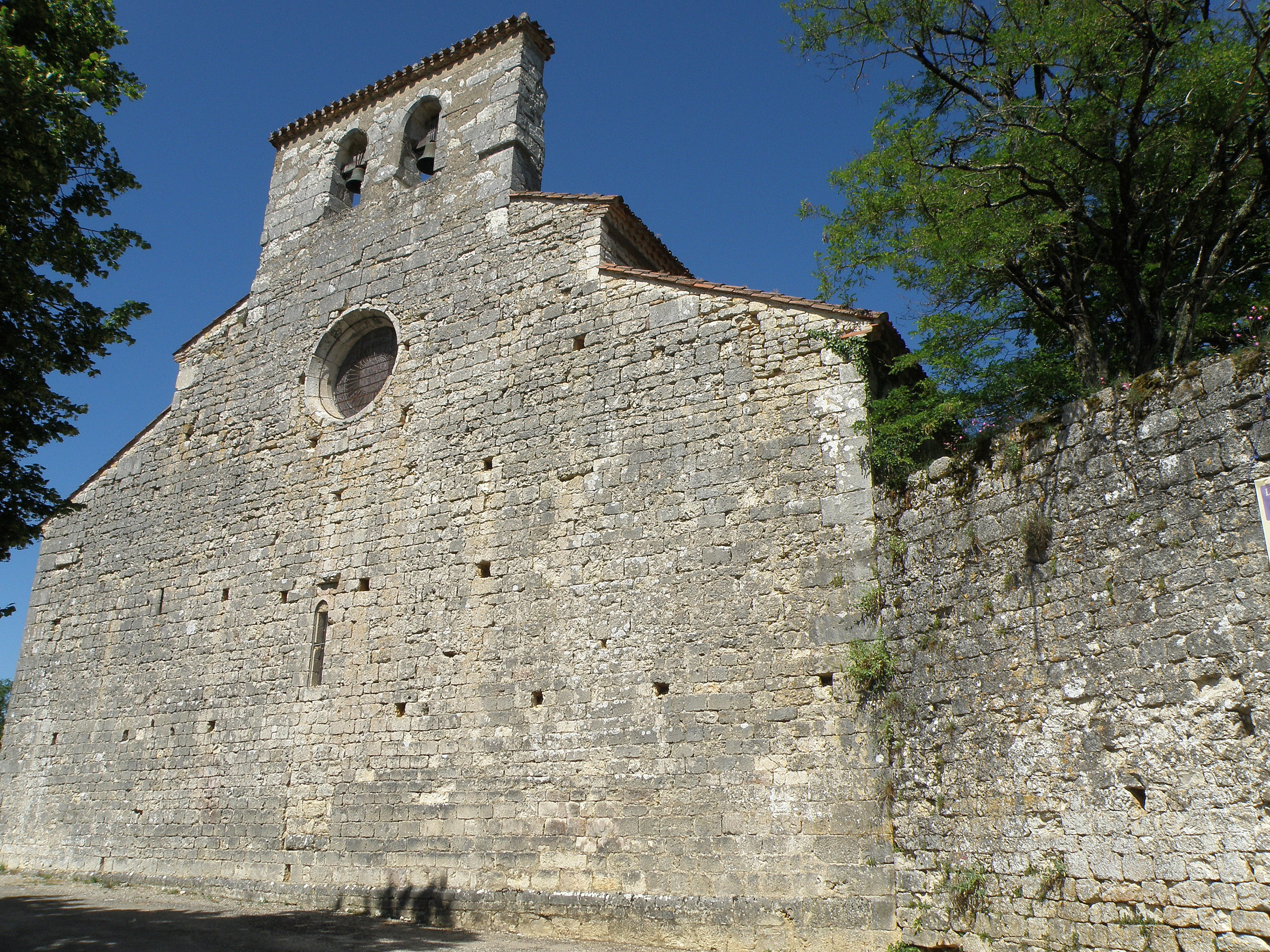 Bélaye, village et commune du dép. du Lot, région Midi-Pyrénées, France. Église Grande, ou Église de l’Hôpital (XIVe siècle), façade occidentale.